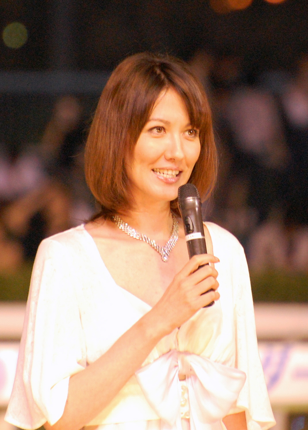 山本モナ 大井競馬場